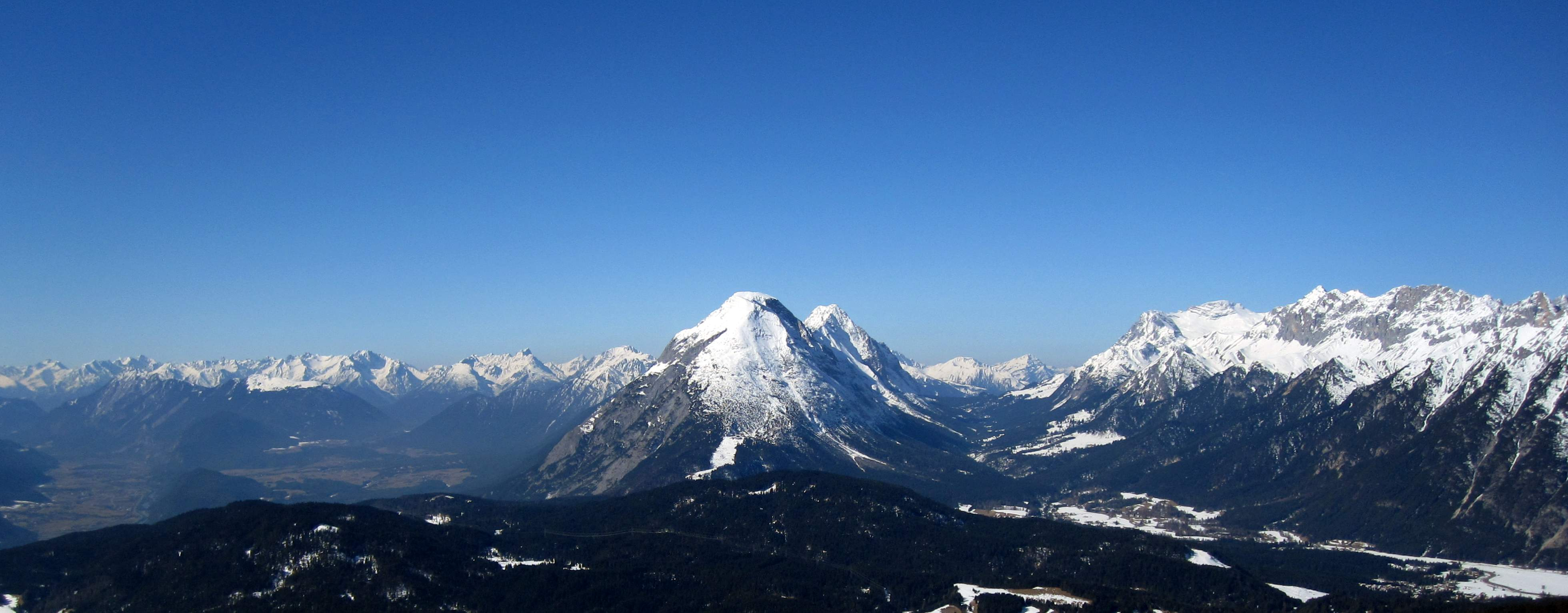 Inntal, Mieminger Plateau, Mieminger Gebirge mit Hoher Munde und Hochwand, Gaistal (dahinter: Gartnerwand und Thaneller), Wettersteingebirge vom Seefelder Joch aus gesehen